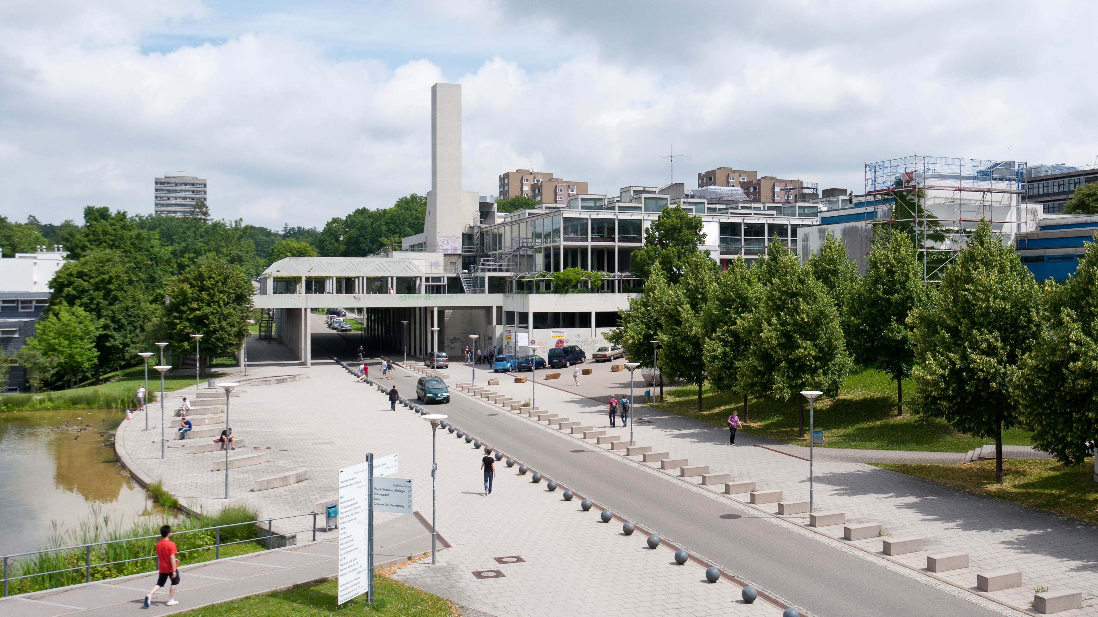 Mensagebäude auf dem Vaihinger Campus der Universität Stuttgart.